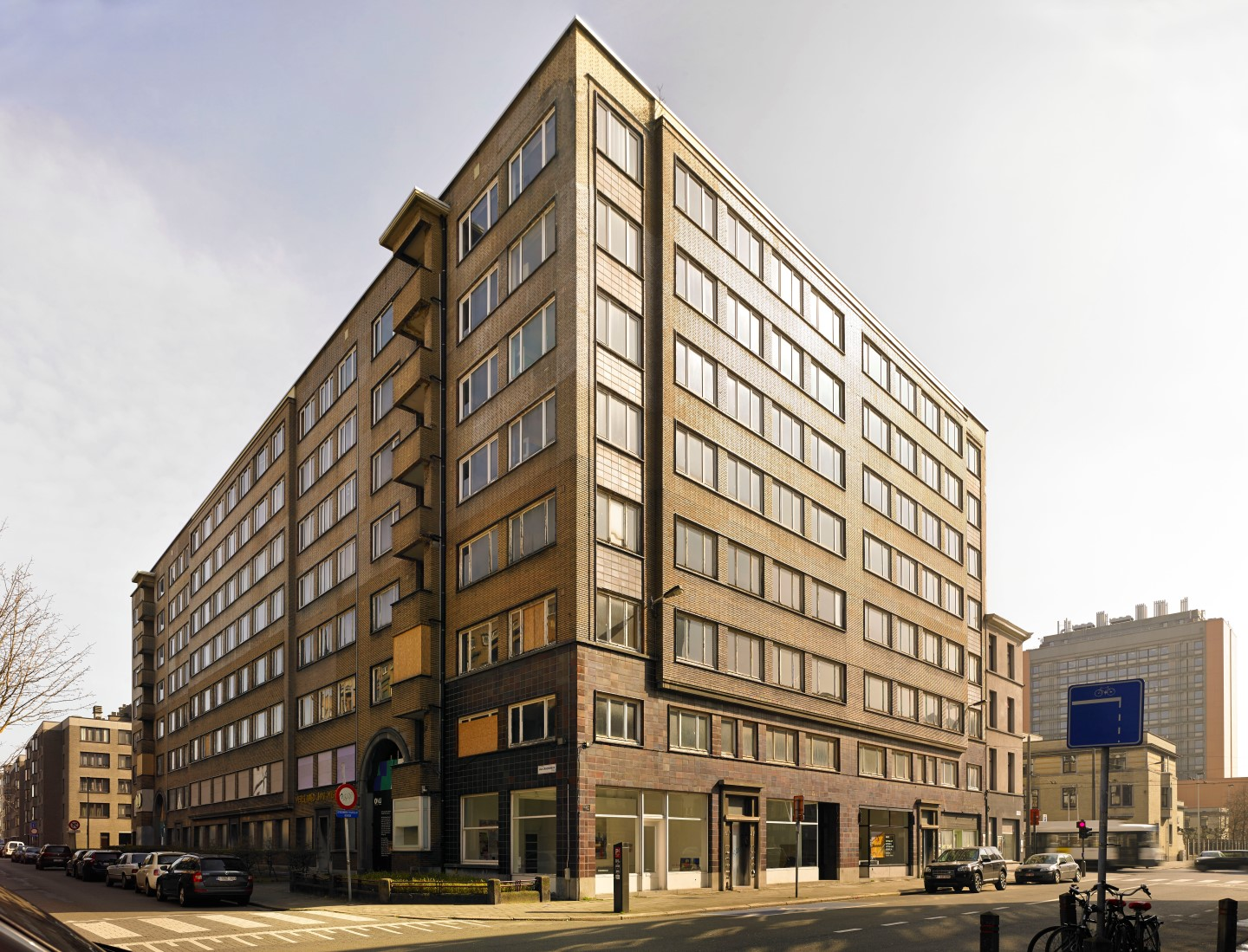 Antwerpen Kronenburgstraat 41, Van Craesbeeckstraat 23-31